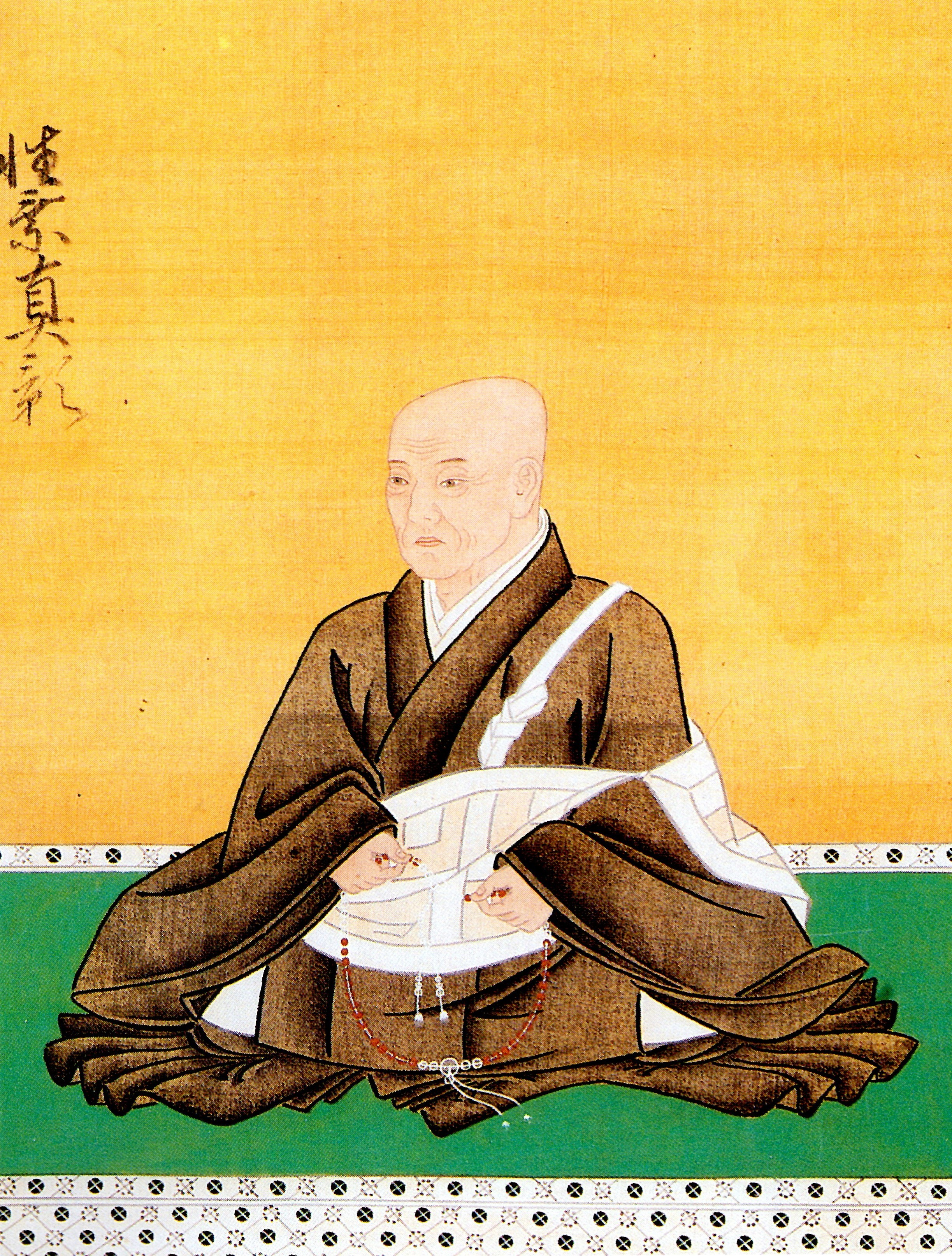 下間仲孝の肖像。